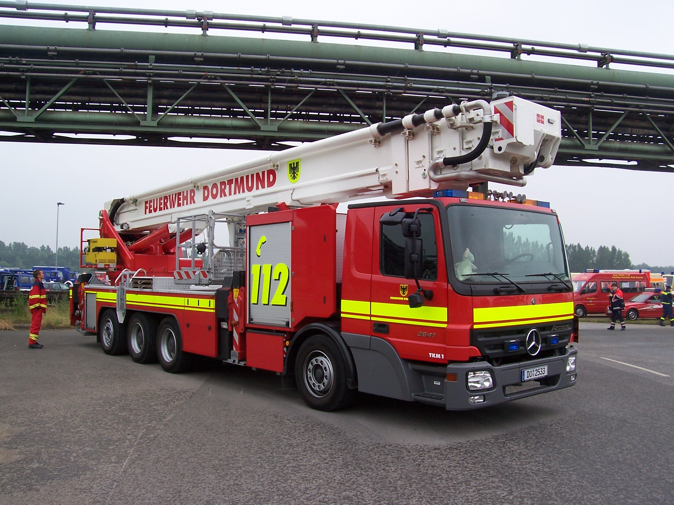 Teleskopmastfahrzeug (TKM1) der Berufsfeuerwehr Dortmund - Fire engine of the fire department Dortmund, Germany